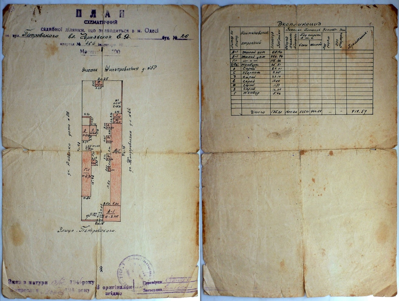 1946 год. План садового участка на Петровского, 26, Одесса. Владелец Чернявская Елизавета Яковлевна.